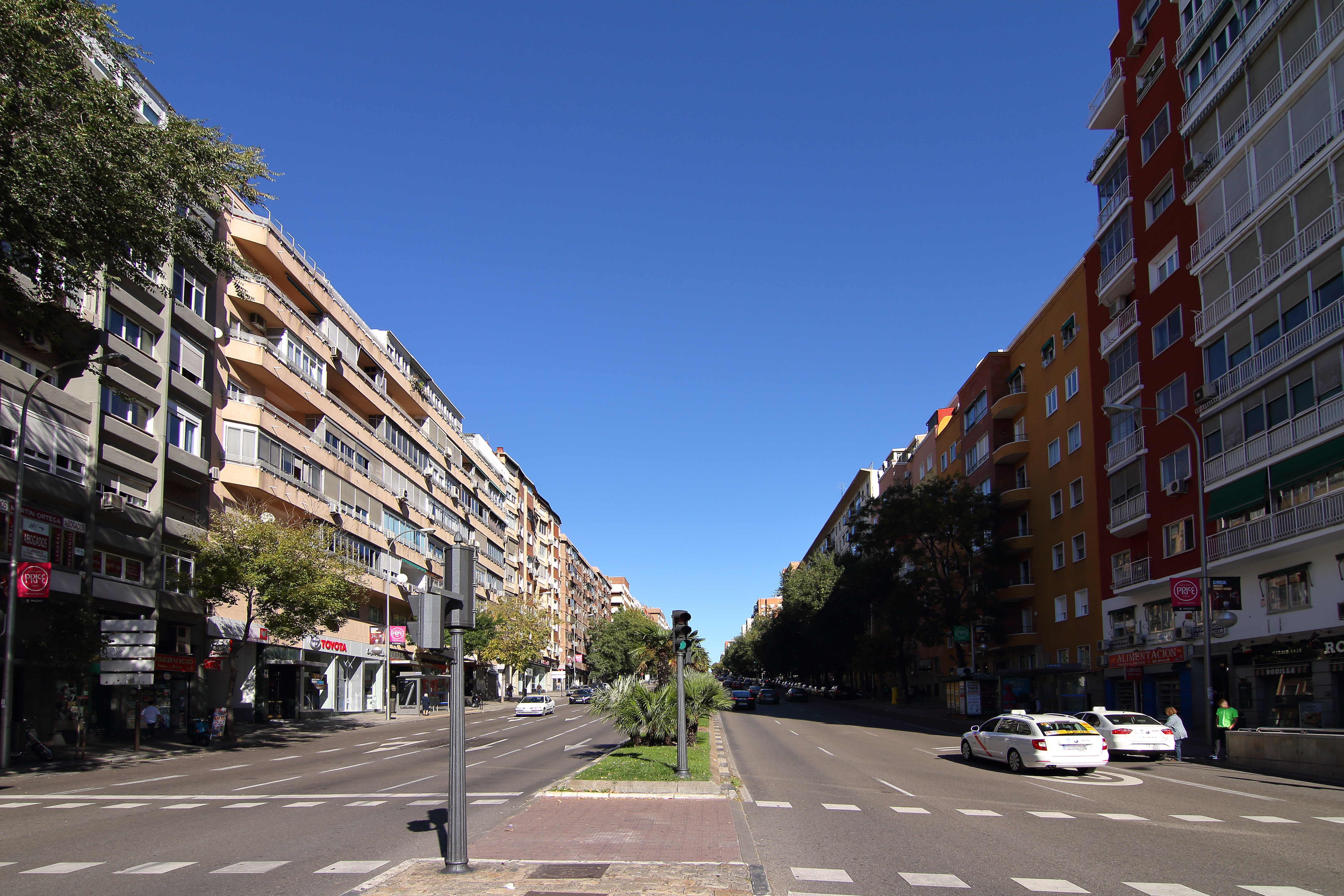 Calle del Doctor Esquerdo, desde la plaza de Conde de Casal